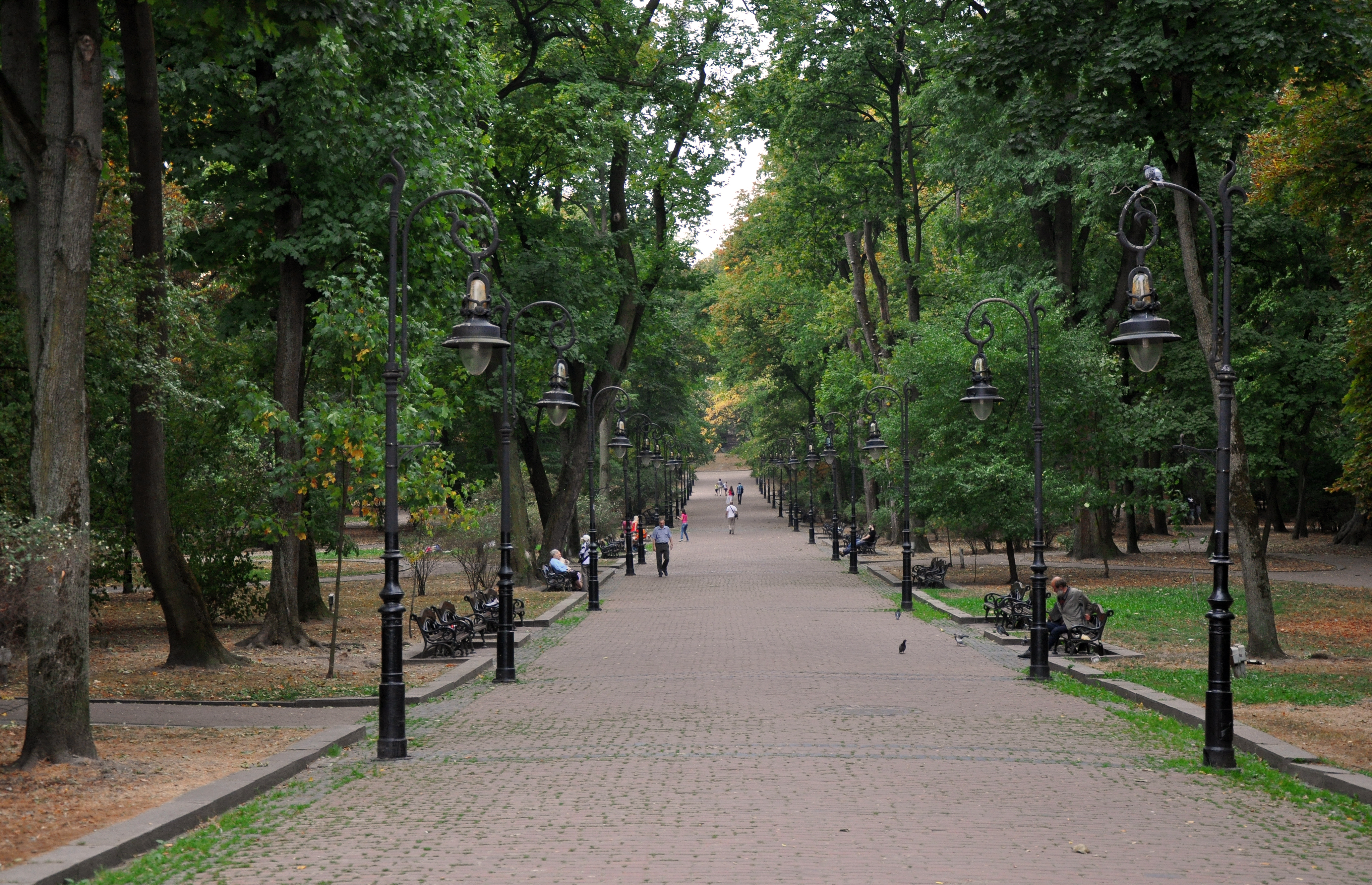 Парк ім. І. Франка, м. Львів